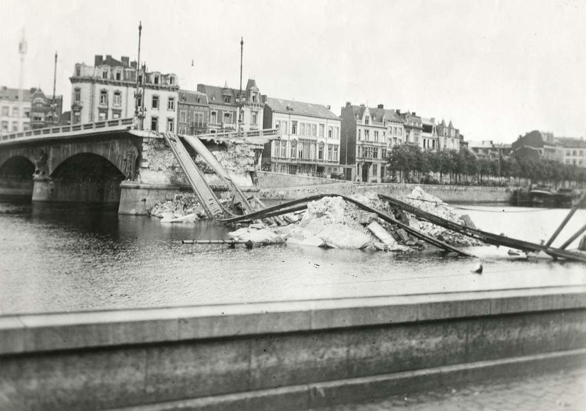 Pont Léopold Liège 1914